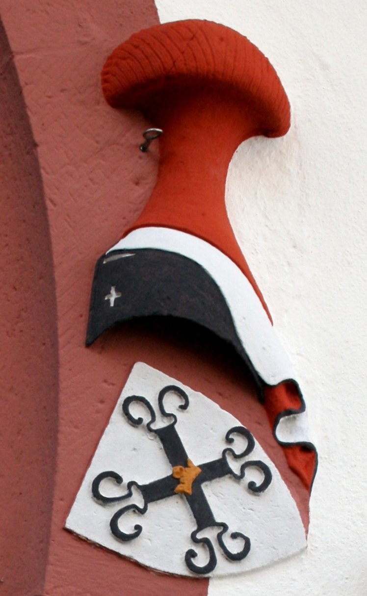 Detail vom Eingang der Kirche in Lindheim, Wappen der Herren von Bueches.